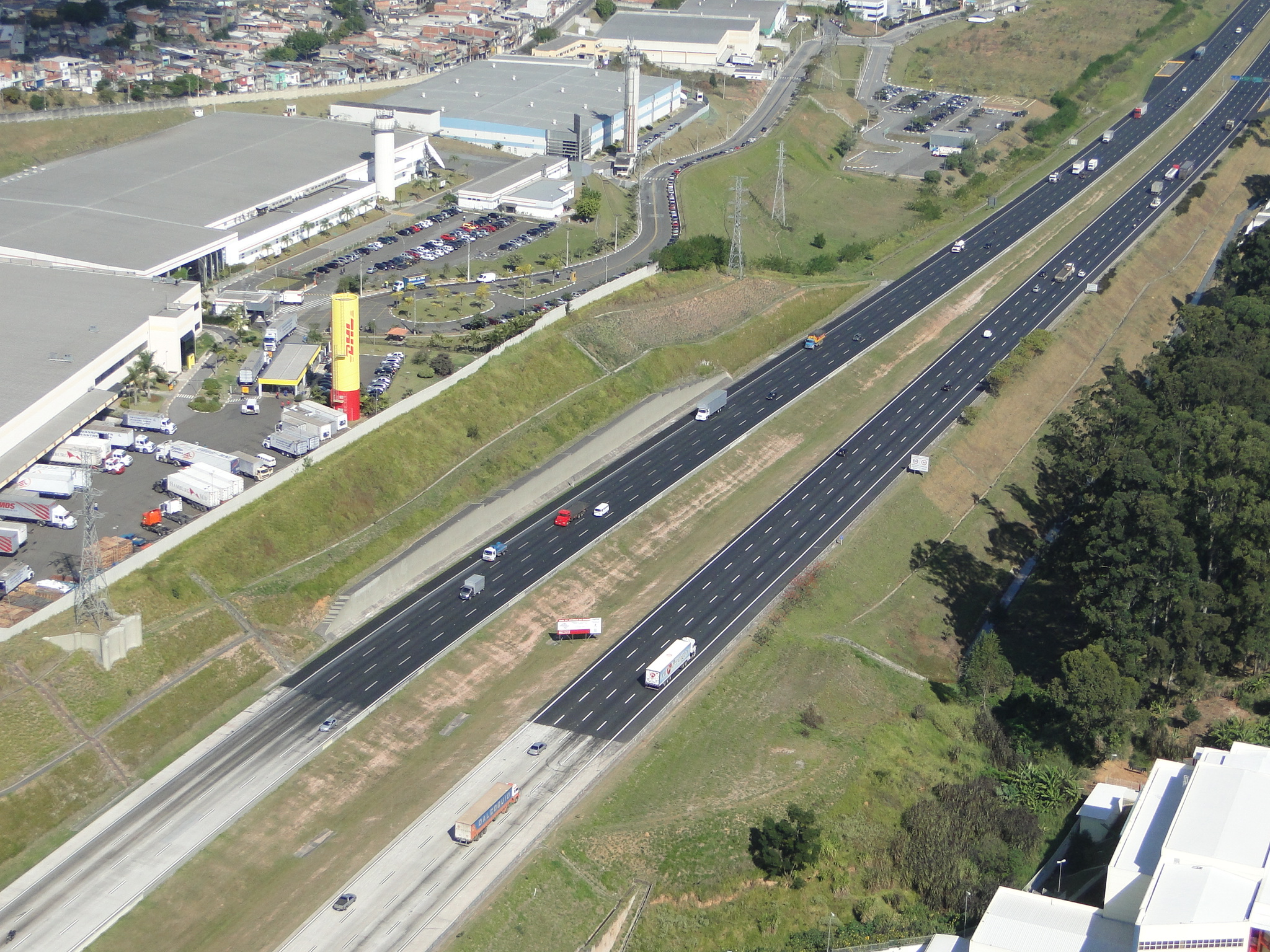 Rodoanel Mário Covas